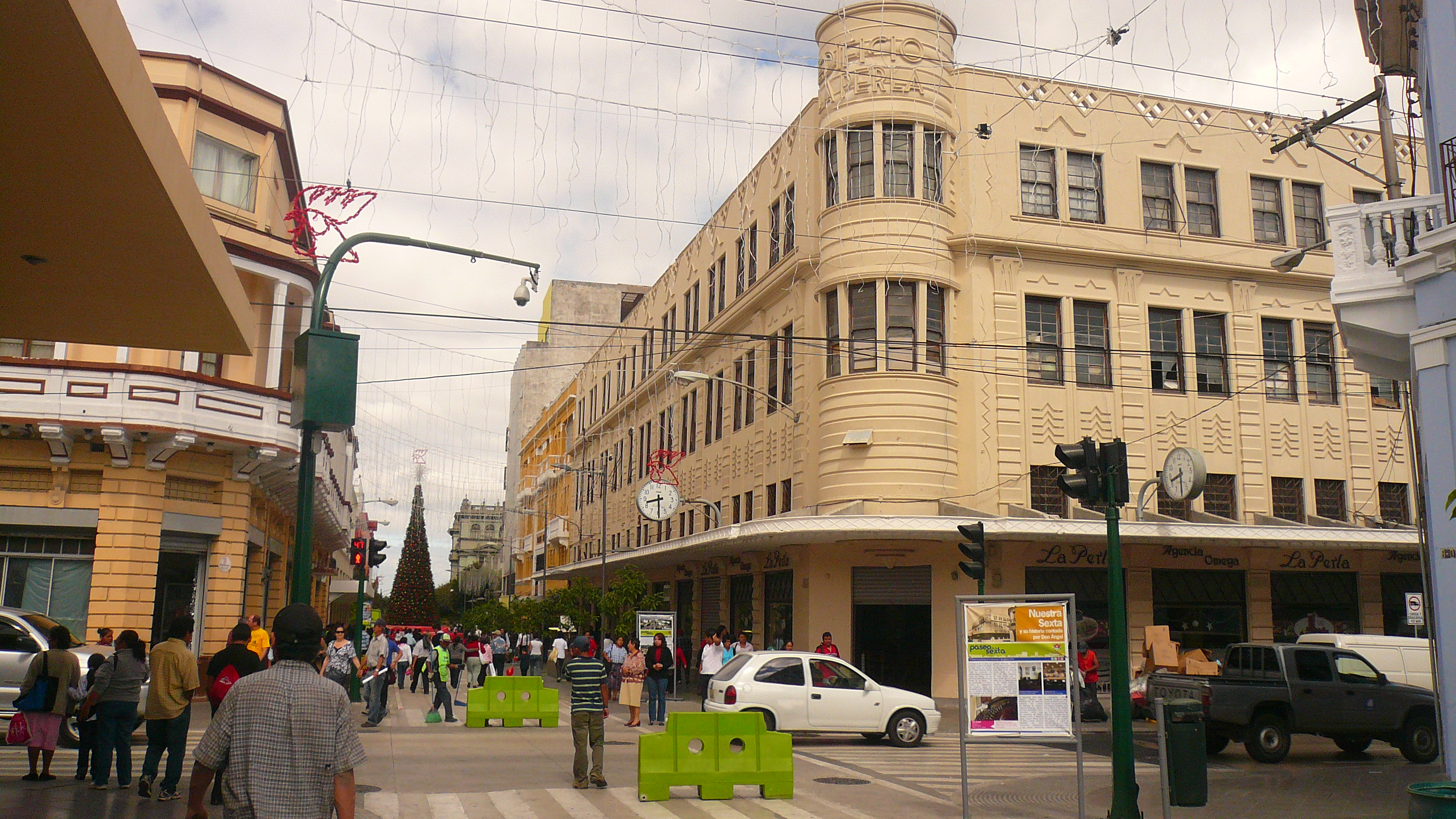 La 6ta avenida peatonal finalmente Guatemala City